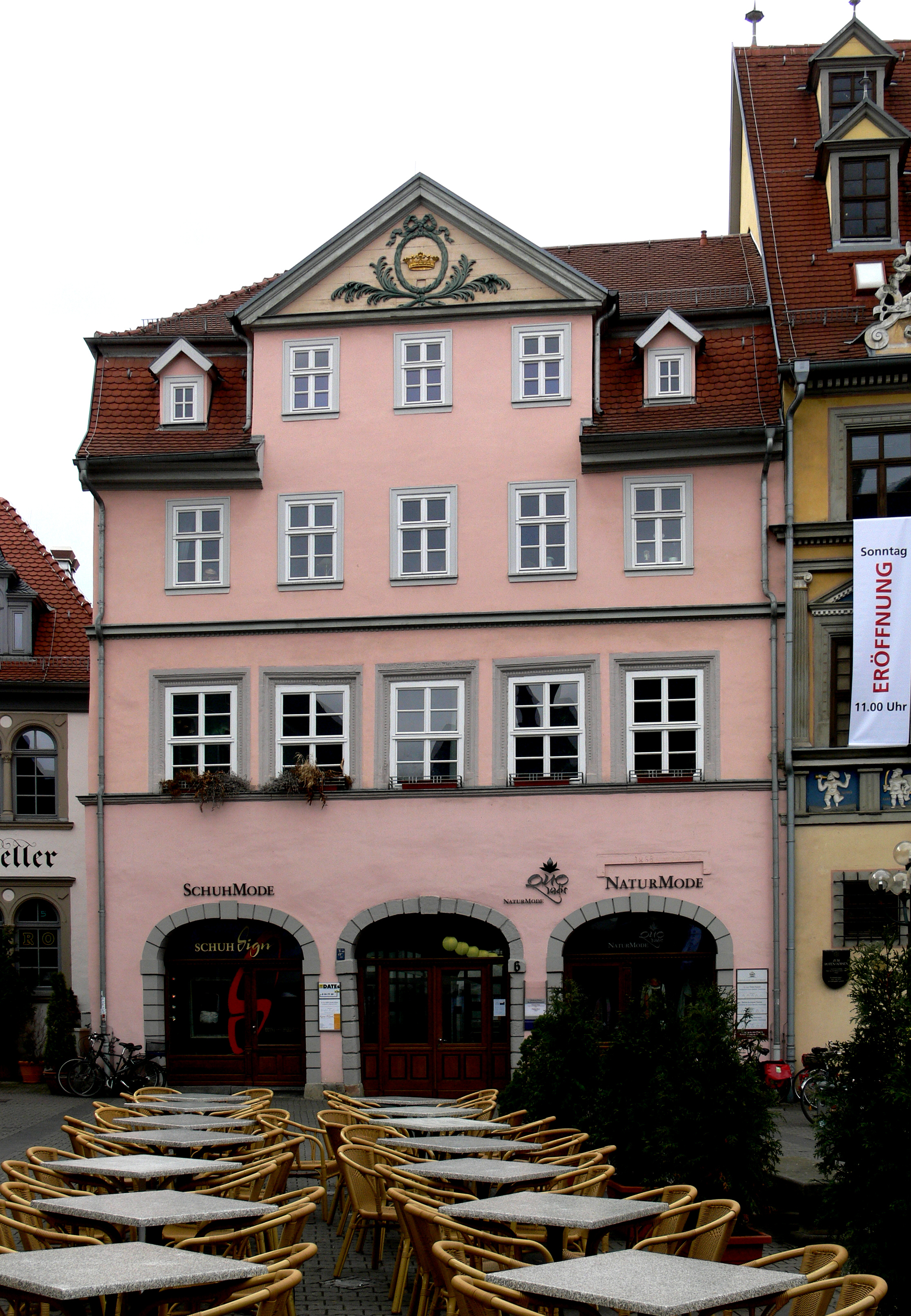 Fischmarkt, Erfurt Haus Fischmarkt 6